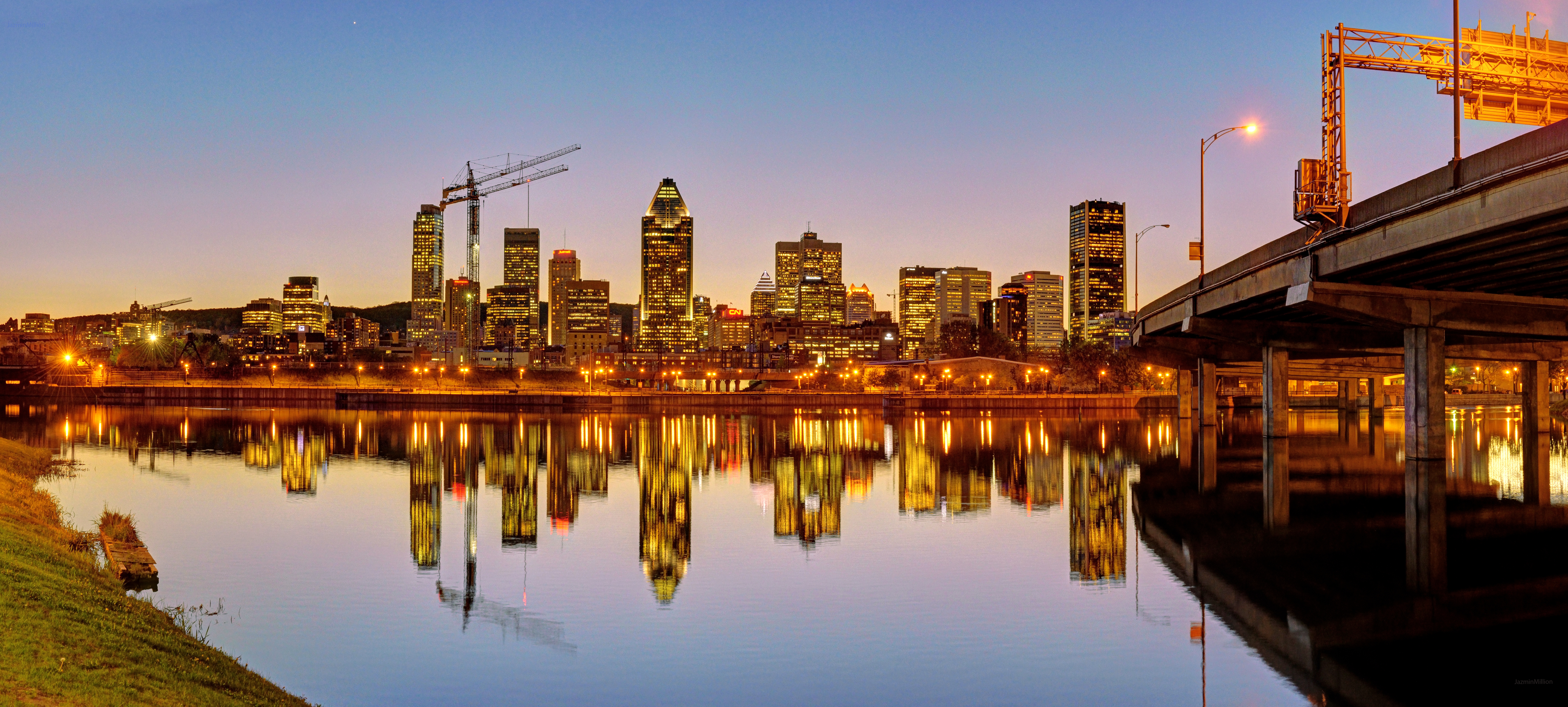 Montreal skyline